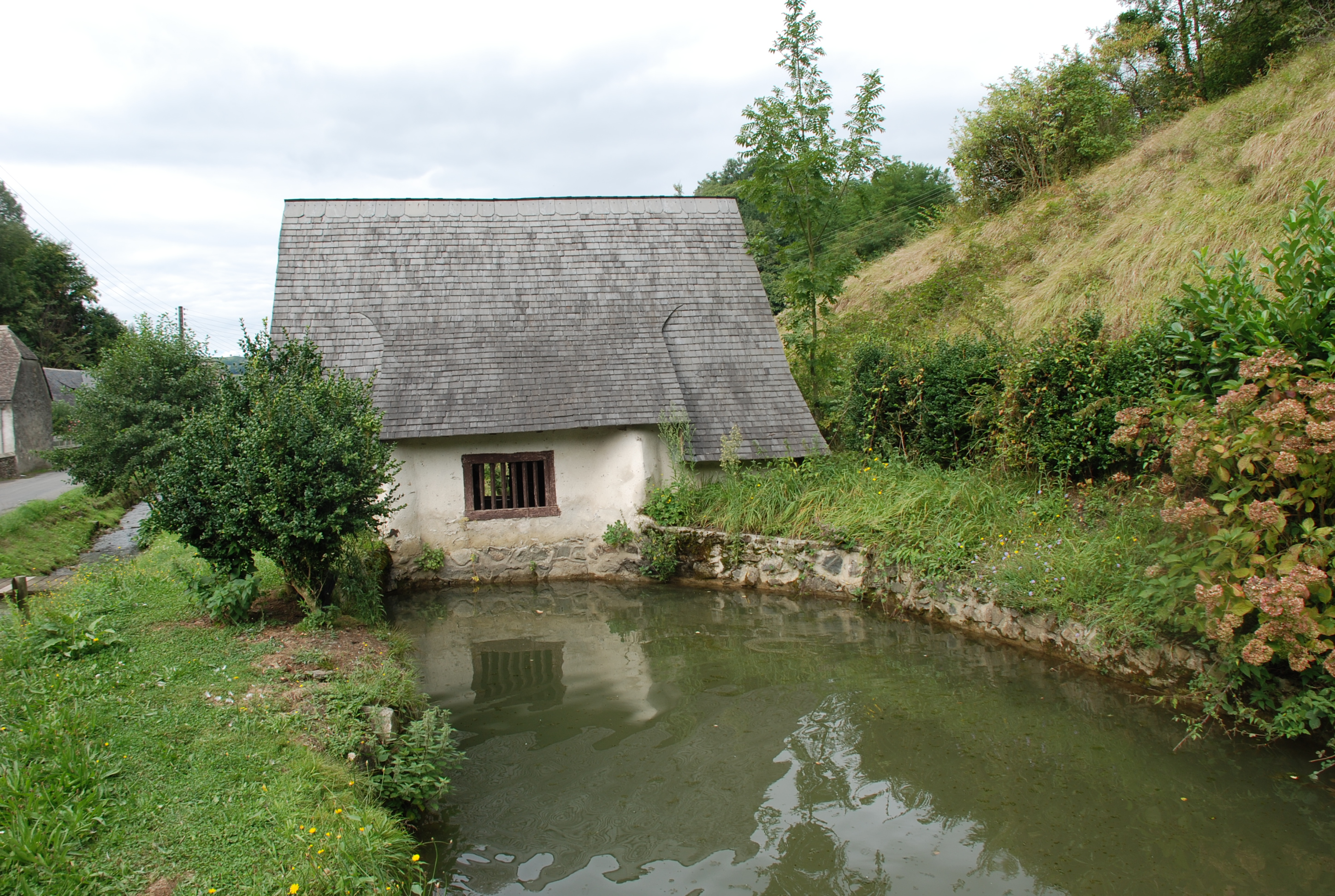 Moulin des Angles (Hautes-Pyrénées), sur la rivière Echez. Ce moulin est toujours en activité sur demande. Voir le maire des Angles Jean Cassou